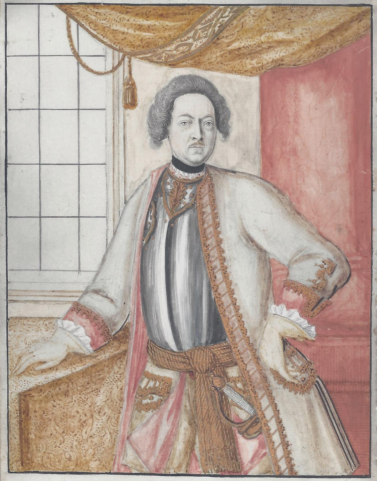 Unbekannter Meister des 18. Jahrhunderts: Heinrich XXV. von Reuß-Gera, goldgehöhte Miniatur auf Pergament, rückseitig beschriftet: Heinrich / der / XXVte / Graff / von / Reussen / pictus / 1726. Alte Inventarnummer: A-437